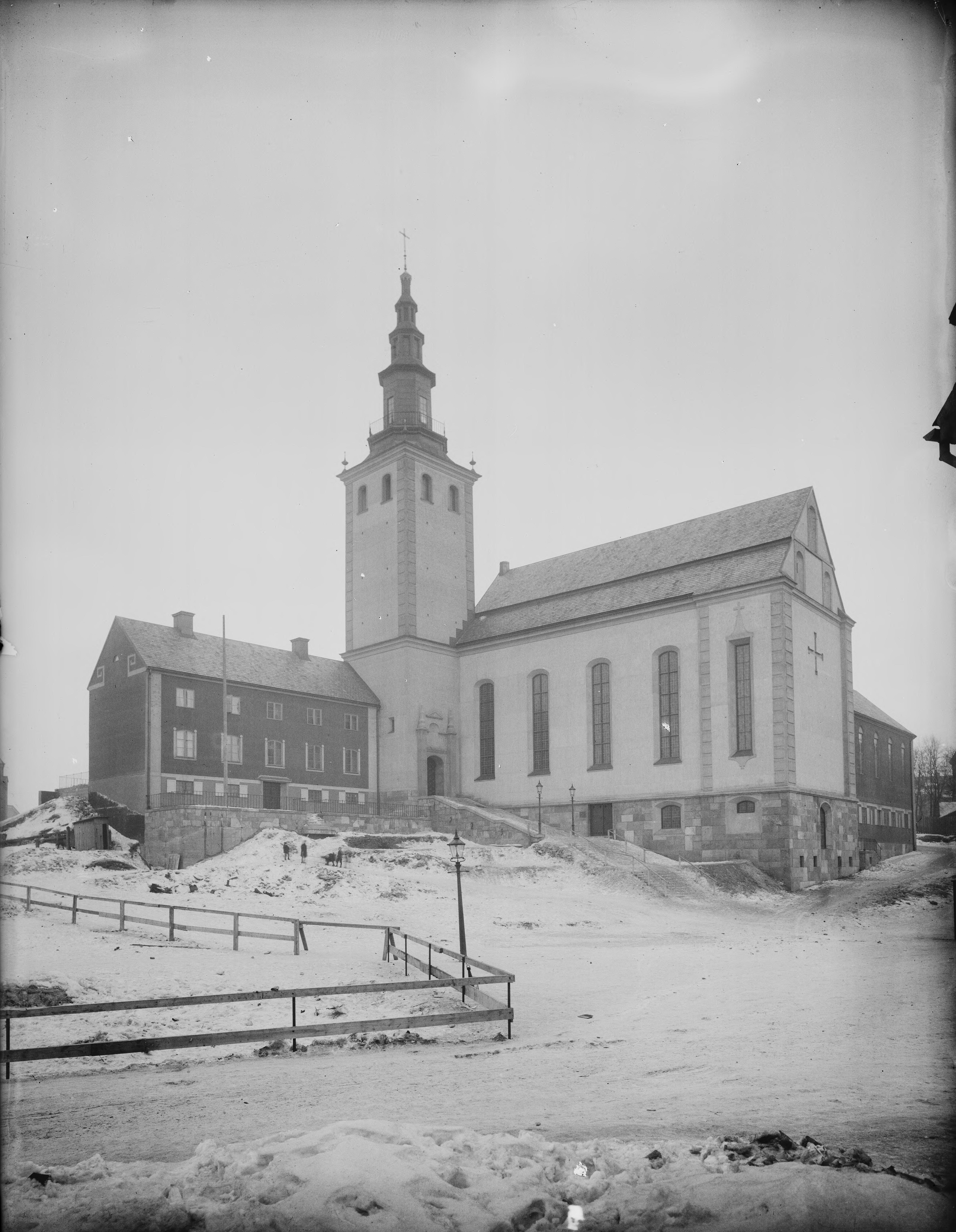 Bildet er hentet fra Nasjonalbibliotekets bildesamling. Anmerkninger til bildet var: Påskrift arkivark: Den svenske kirke Eldste arkivnummer: 840 Hammersborg,Oslo, Oslo, Oslo